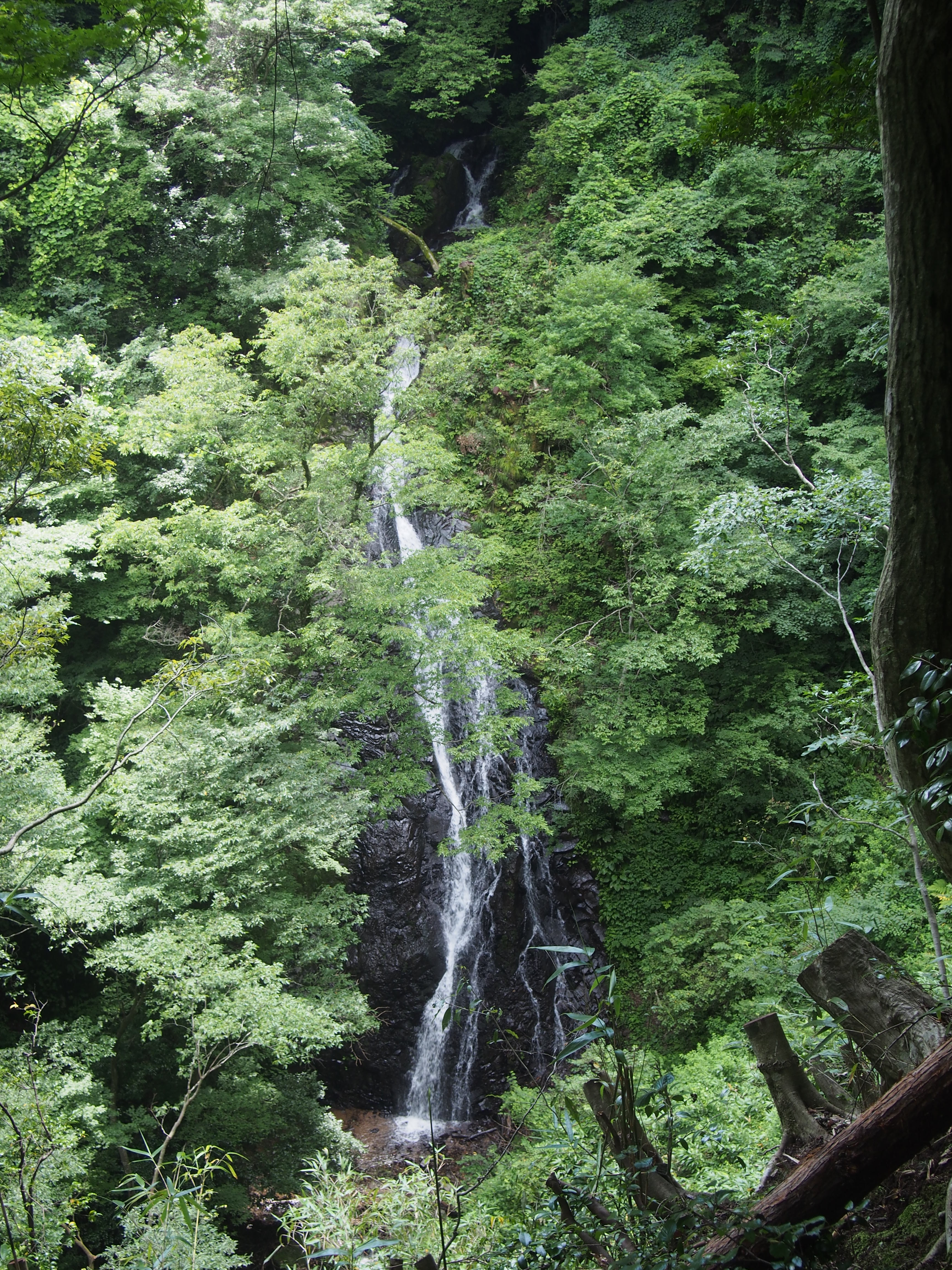 味土野大滝 京都府京丹後市弥栄町須川（味土野）